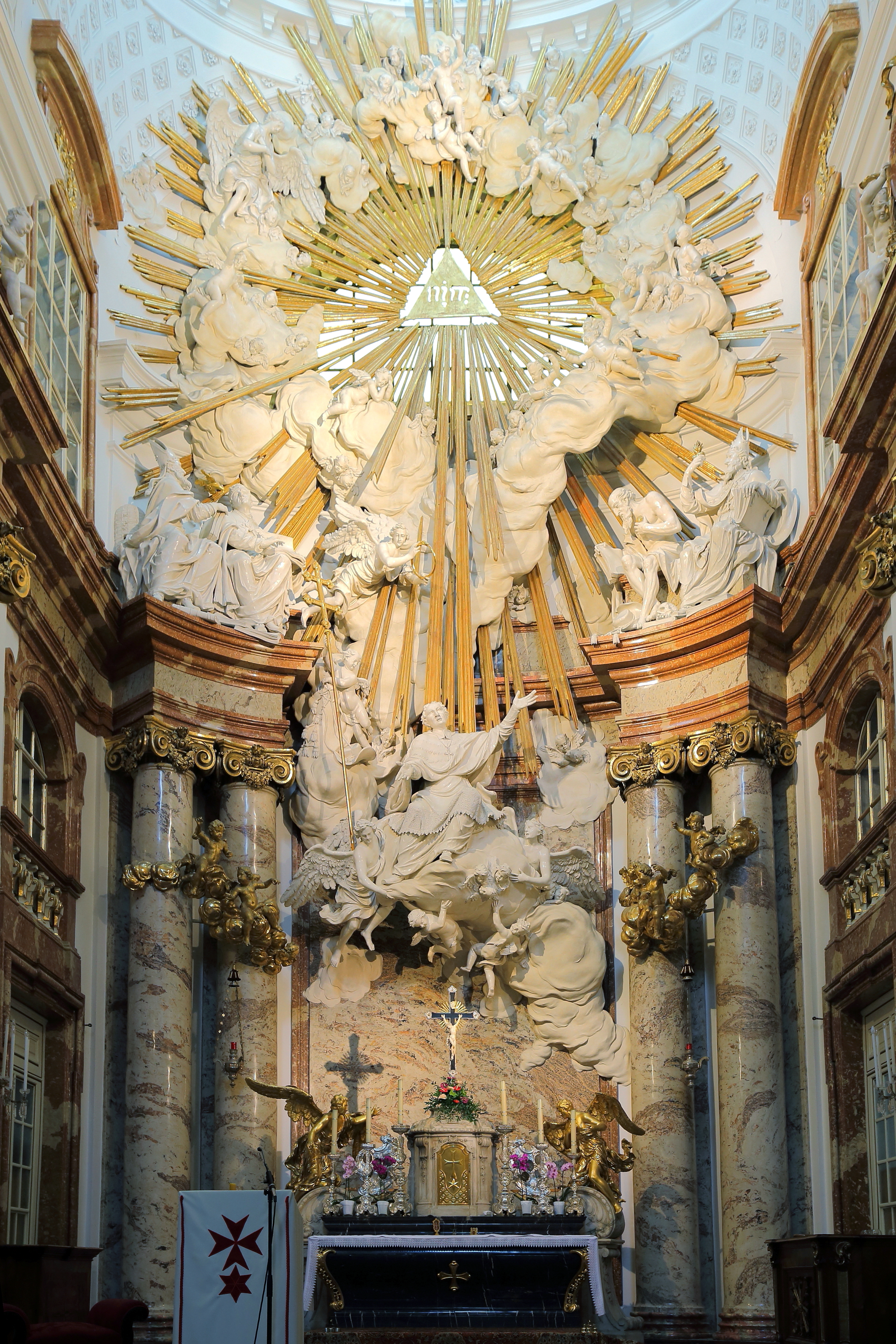 Hochalter der Wiener Karlskirche mit der Apotheose des hl. Karl Borromäus, eine Stuckatur von Alberto Camesina.